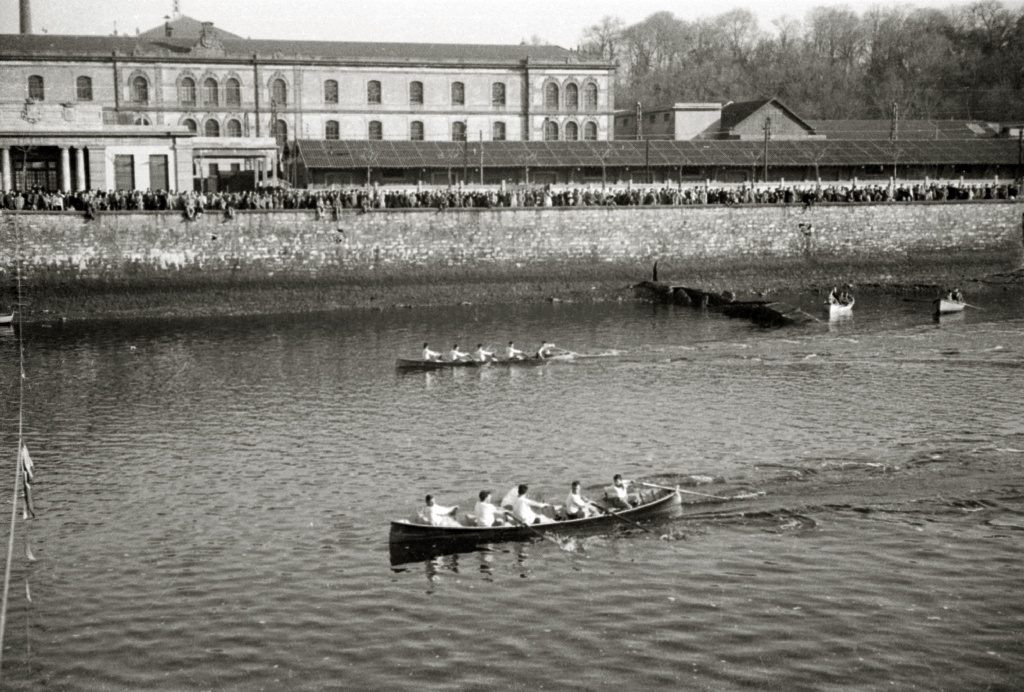 Título original: Regatas de bateles en el río Urumea (6/9) Localización: San Sebastián (Guipúzcoa)